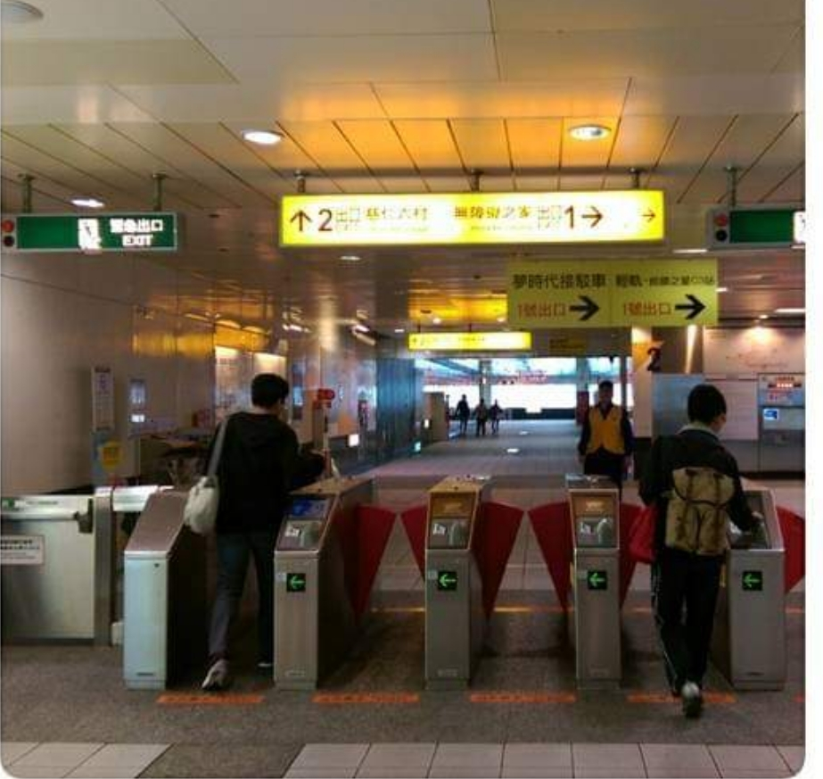 凱旋站大廳引導1號出口往輕軌方向